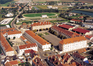 Vue aériennes des Casernes d'Auxonne (Côte d'Or)